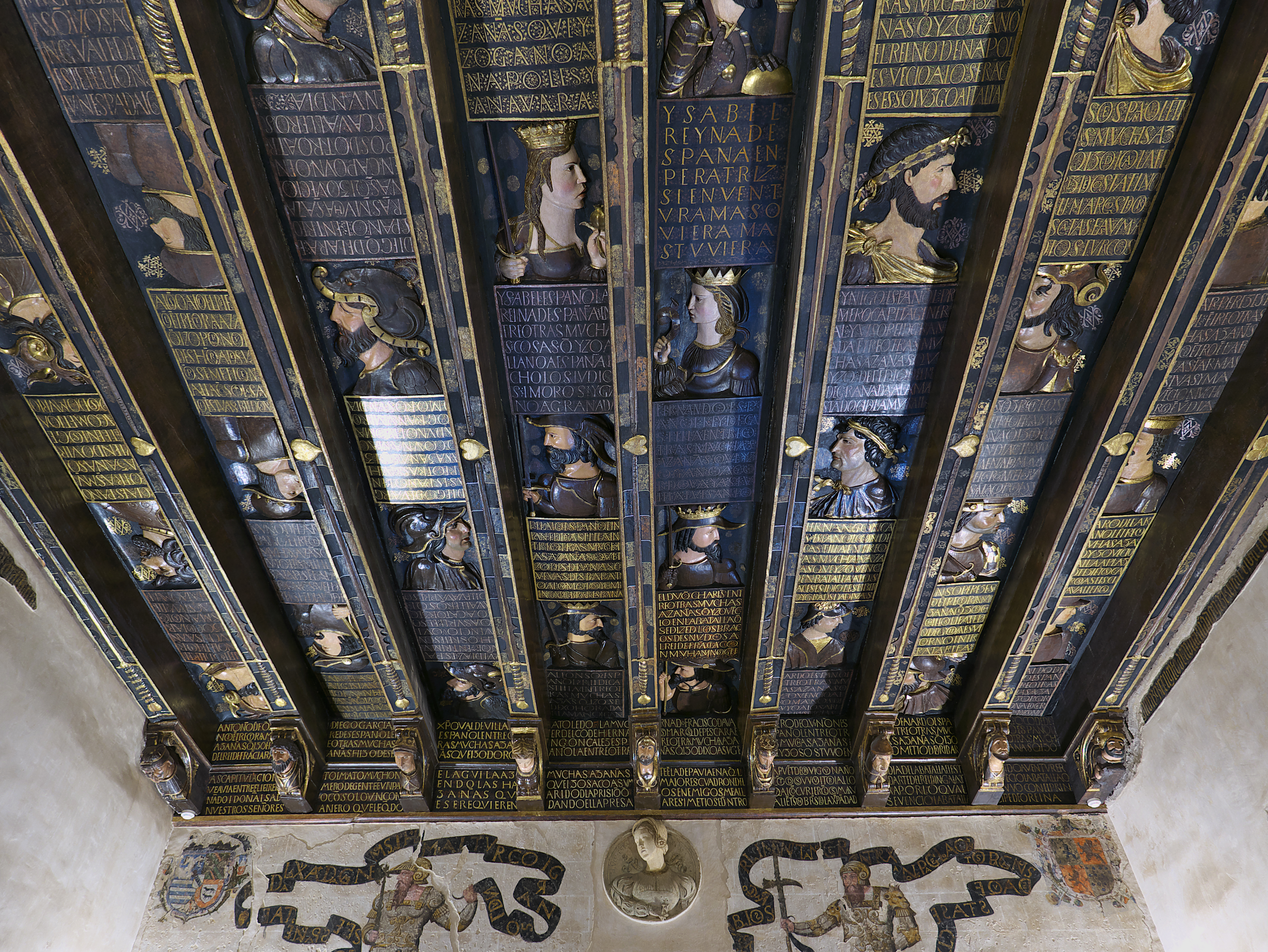 Reservado a los grandes héroes y heroínas. Cuarenta y ocho héroes y heroínas de la historia española que defendieron su identidad, contra los moros, el turco, el rey de Francia ... y como personaje central Carlos I de España.